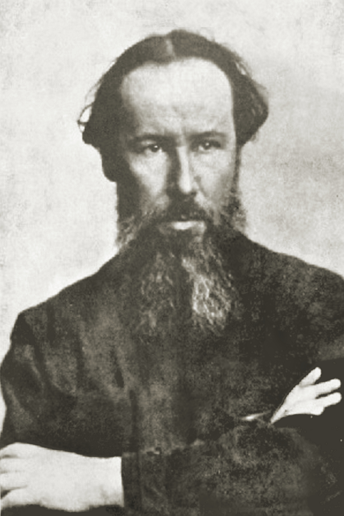 В. Фаворский (фото 1920-х годов)